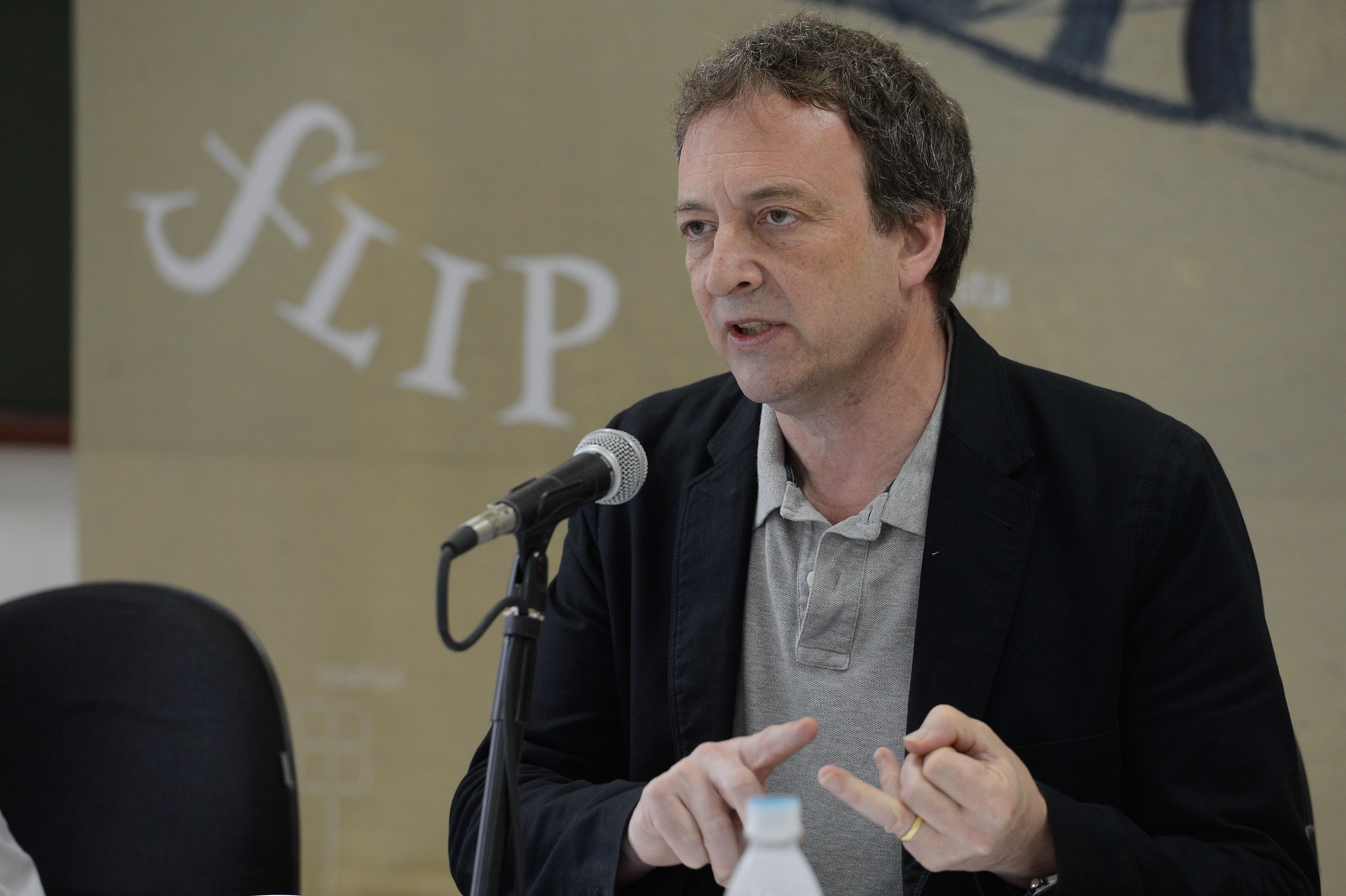 Paraty (RJ) - O escritor britânico Misha Glenny fala sobre o trabalho de produção do livro O dono do morro, biografia do narcotraficante carioca Nem, chefe do tráfico de drogas na Rocinha, no Rio, preso em 2011 (Tomaz Silva/Agência Brasil)